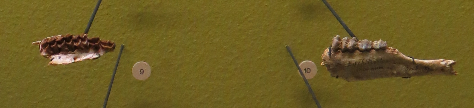 Fossil of Bachitherium - Took the picture at Natural History Museum, Basel